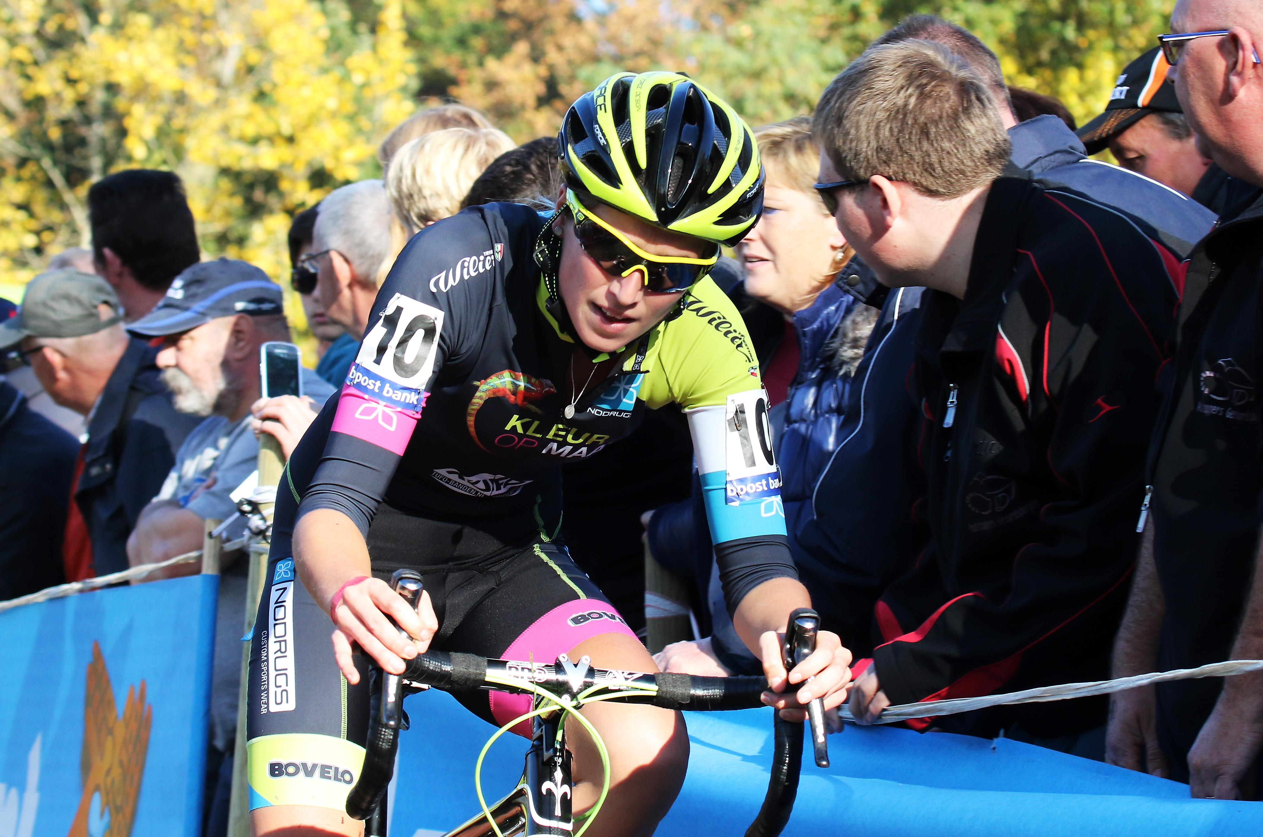 Femke tijdens Koppenbergcross 2015